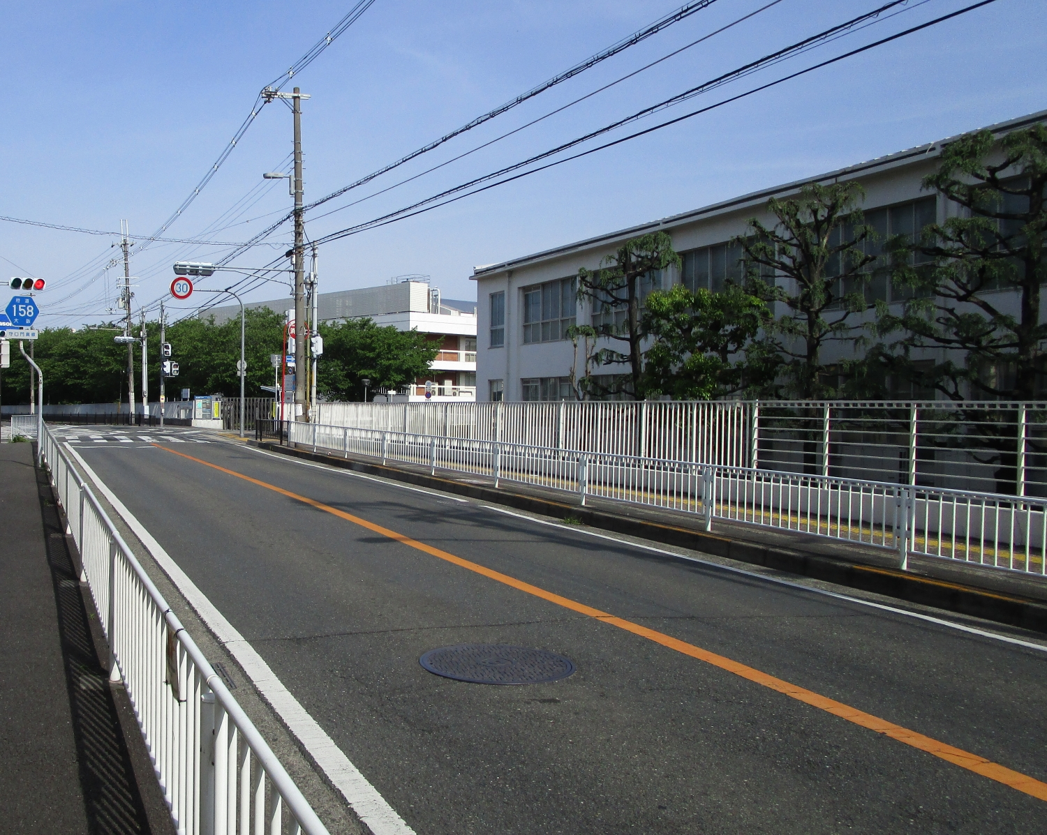 大阪府道158号守口門真線（西三荘駅付近より撮影）